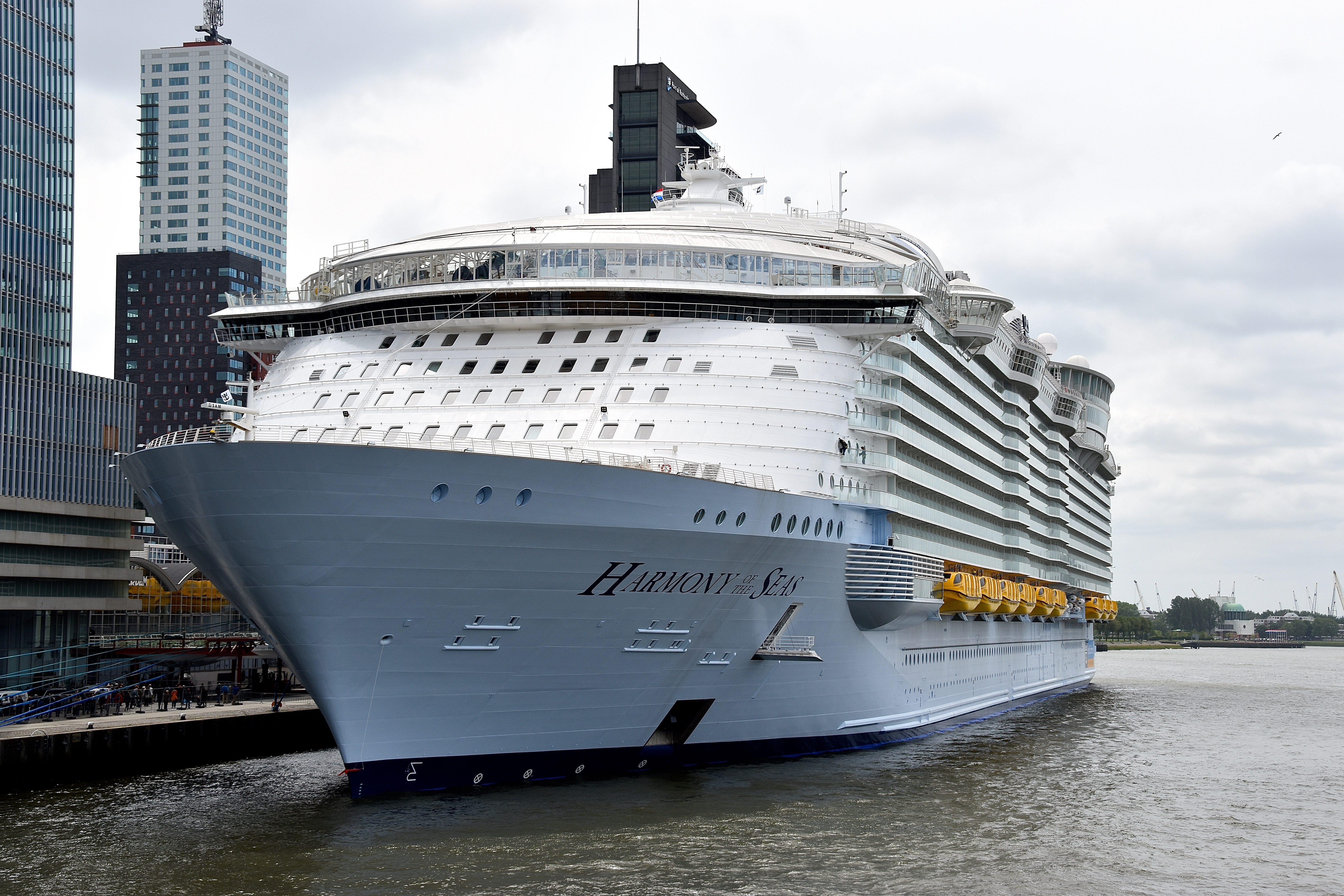 De Harmony of the Seas is een cruiseschip uit de Oasis class van Royal Caribbean International. In 32 maanden gebouwd bij Chantiers de l'Atlantique, onderdeel van STX France in Saint-Nazaire en maakte in maart 2016 haar eerste proefvaart. Samen met haar zusterschepen, de Oasis of the Seas en de Allure of the Seas, is ze het grootste passagiersschip ter wereld. De schepen hebben onder andere een zwembad met drie glijbanen, die drie dekken lager uitkomen. Het schip is 362 meter lang en 48 meter breed, waardoor ze tot nu toe het breedste cruiseschip ooit is. In totaal biedt het schip onderdak aan 6360 passagiers en 2394 bemanningsleden. Het schip vaart onder de vlag van de Bahama's.